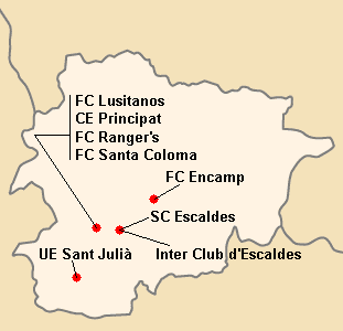 Répartition des clubs en Primera Division 2001-2002.